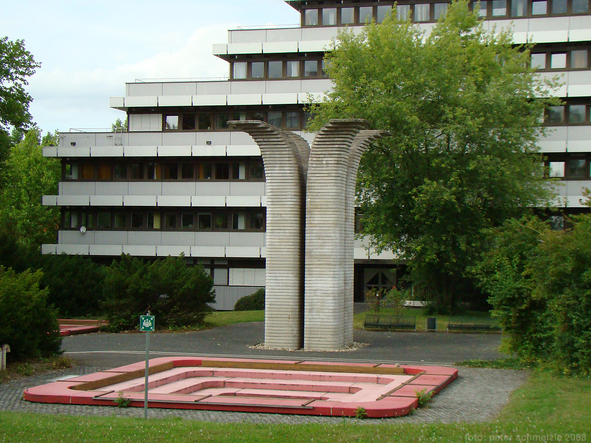 Heilbronner Kapitell (1977) von Thomas Lenk bei der Polizeidrektion Heilbronn